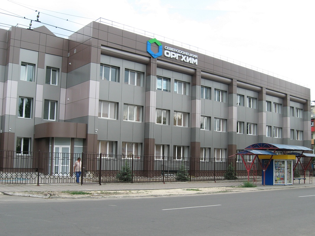 Офис на пр.Советском